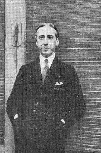 Luciano Taxonera Vivanco, fotografía en Vida Gallega 1919